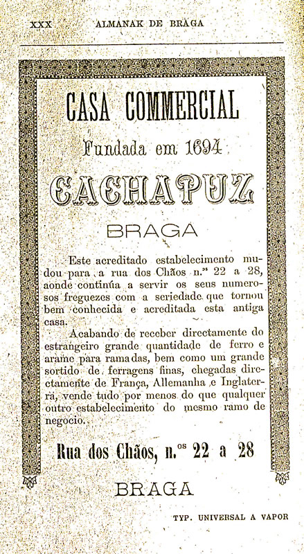 Anúncio sobre Casa Commercial Cachapuz, no Almanak de Braga, 1895.